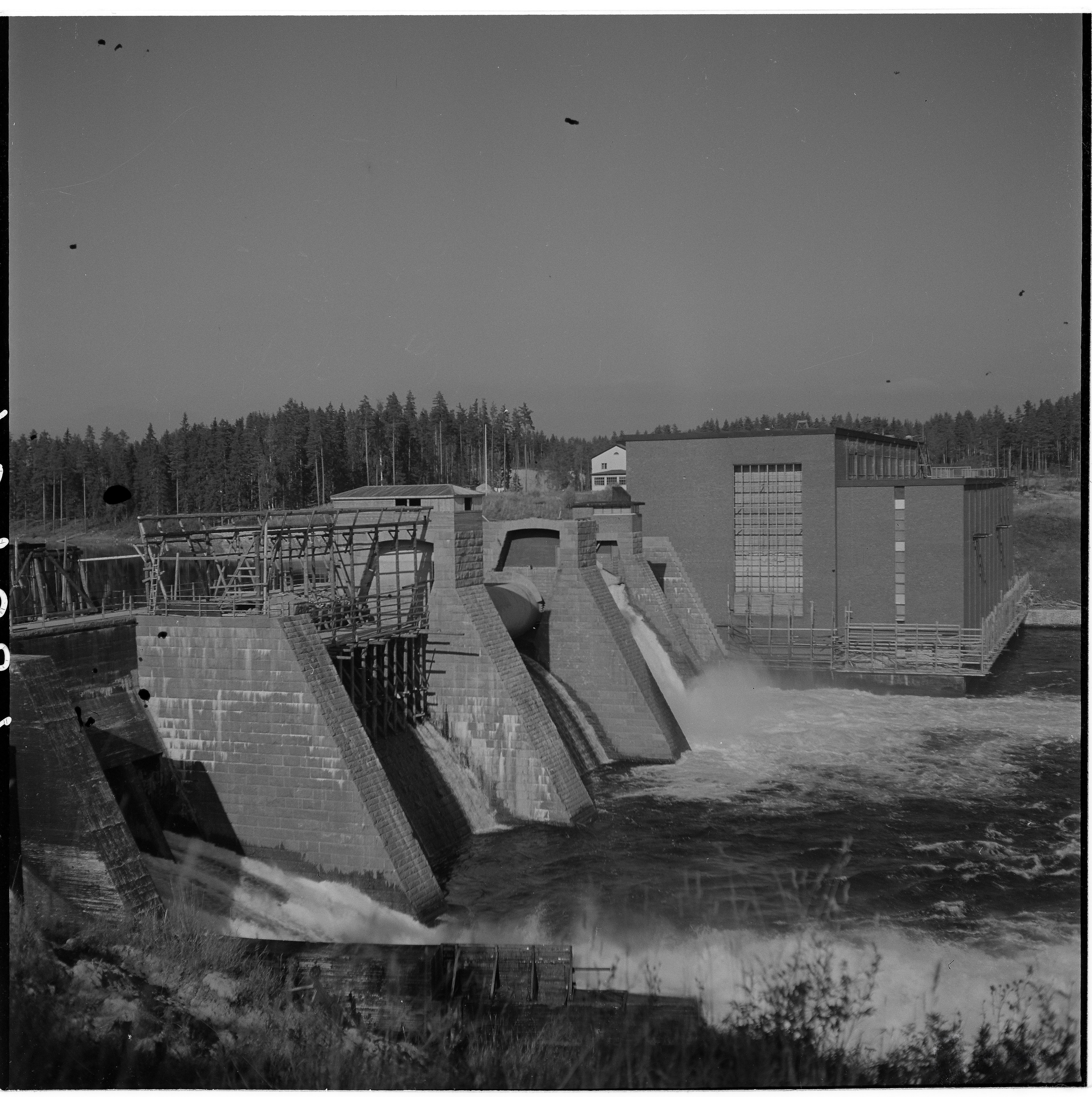 Rouhialan Voimalaitos. Ulkokuvia voimalaitoksen alueelta.